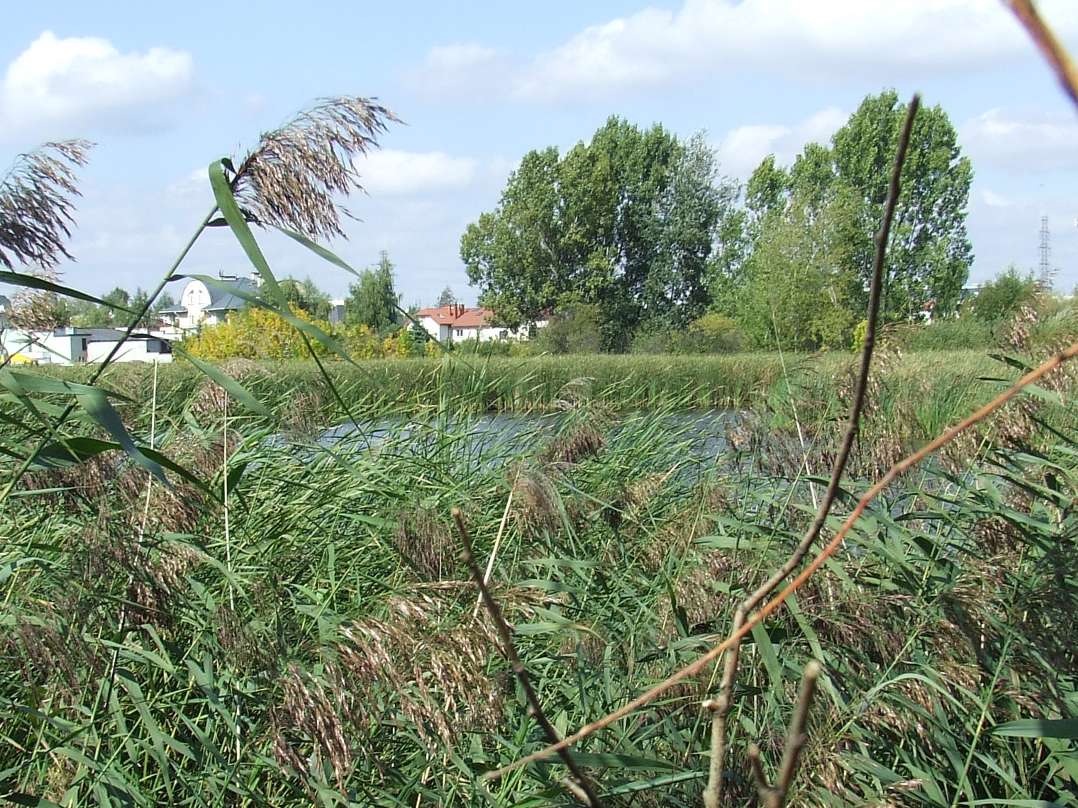 Jezioro Imielińskie, Warszawa